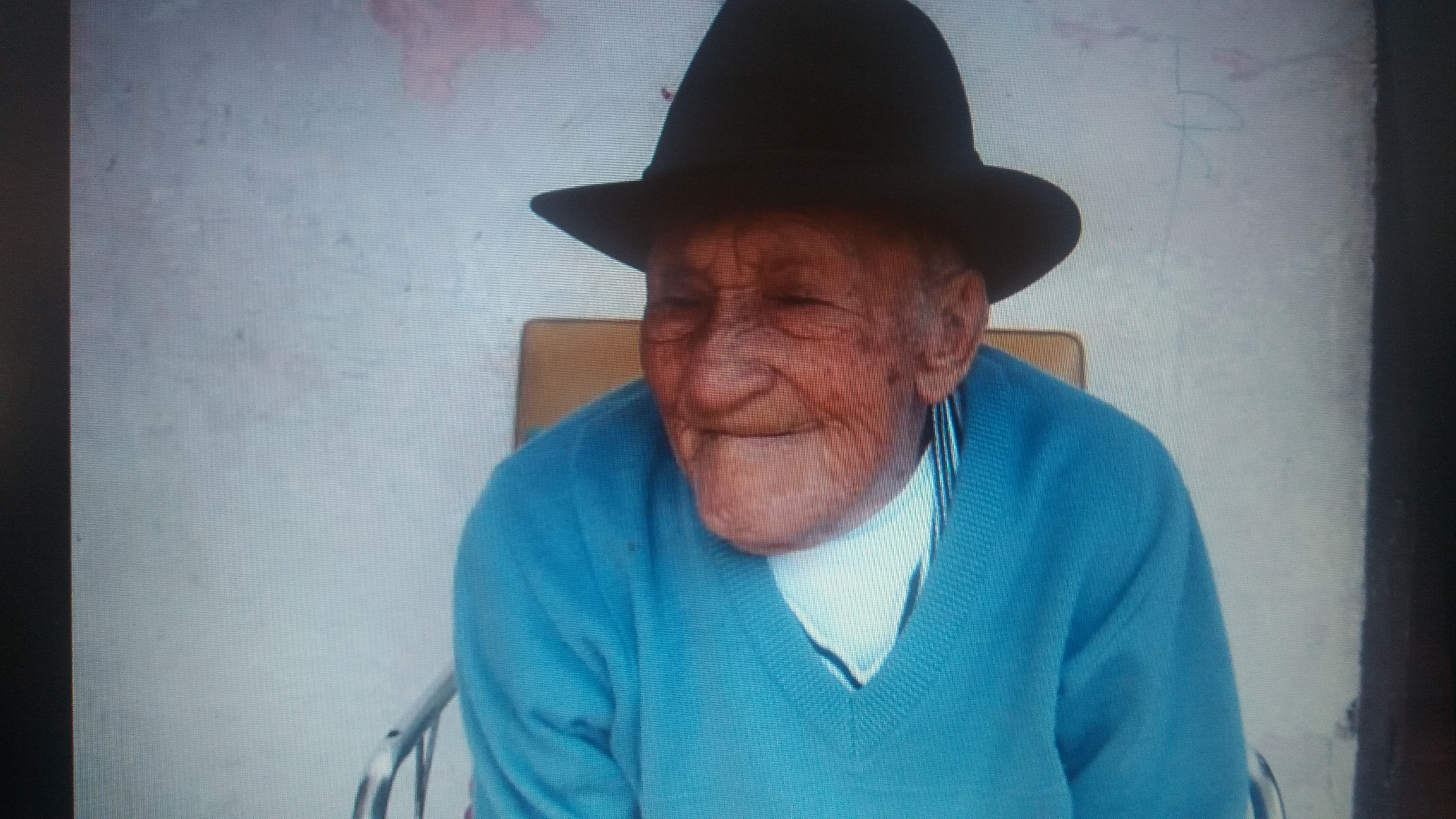 Principal precursor del Festival Pirotécnico